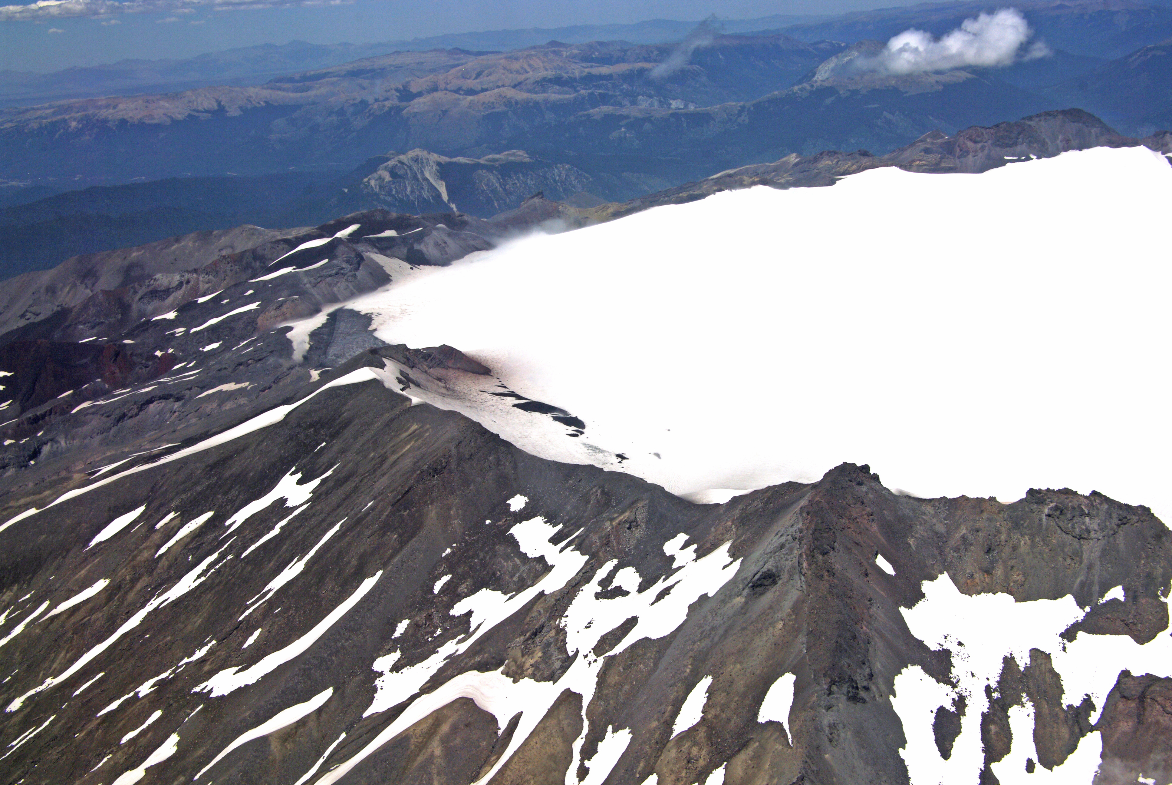 Nevados de Sollipulli